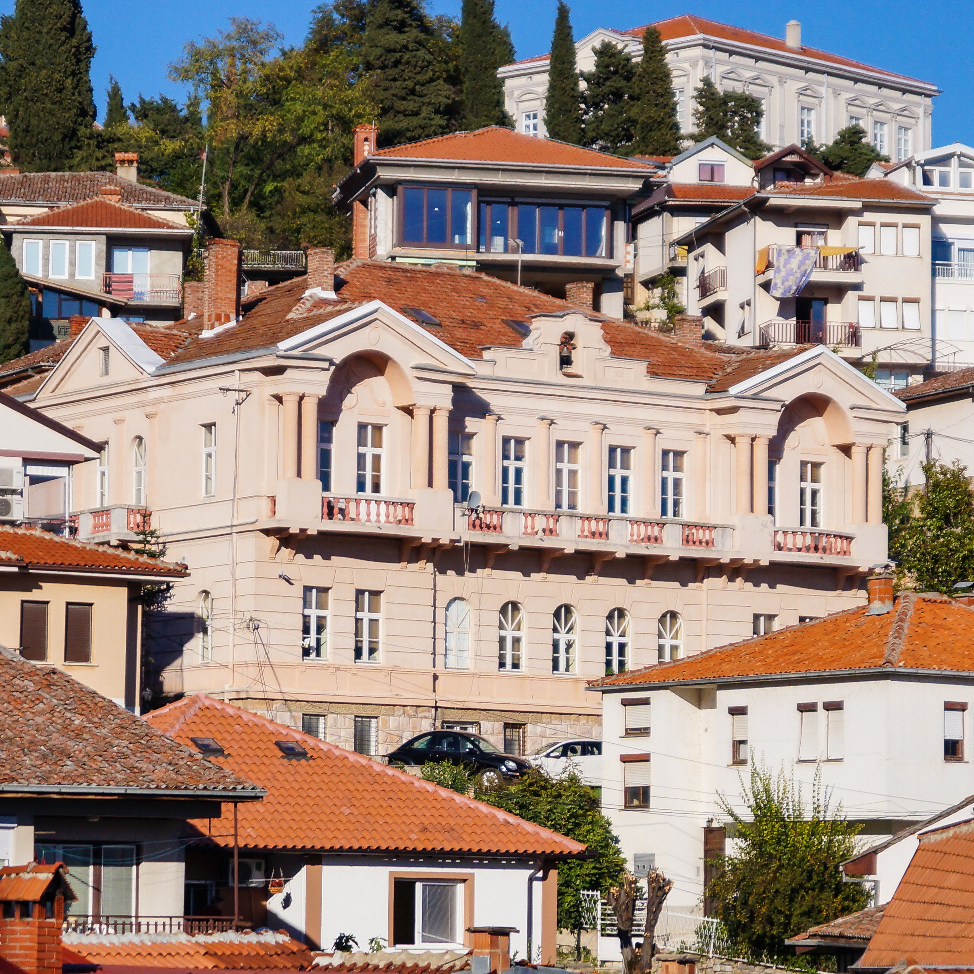 Зградата на Завод за заштита на културните споменици и Народен Музеј, Охрид.